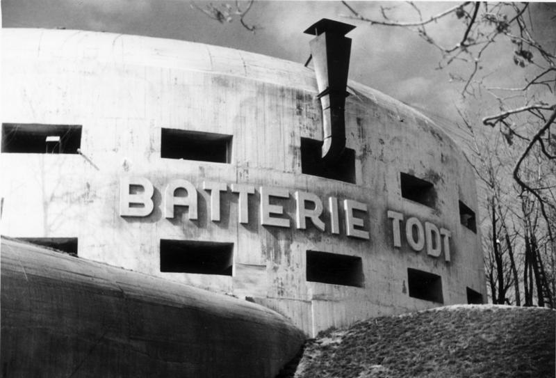 "Batterie Todt", heute bereits ein Begriff für den Feind: ein unbezwinglicher Gegner Aufnahme: OT-Kriegsberichter Maier